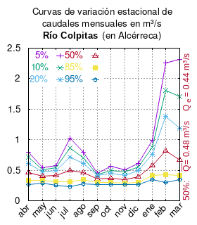 Curva de Variación Estacional del estero Colpitas en Alcérreca. # cita publicación # | apellido = Dirección General de Aguas # | nombre = # | enlace-autor = Ministerio de Obras Públicas (Chile) # | título = Diagnóstico y clasificación de los cursos y cuerpos de agua según objetivos de calidad. Cuenca del río Lluta # | ubicación = Santiago de Chile # | editorial = Ministerio de Obras Públicas (Chile) # | año = 2004 # | edición = # | url = # | urlarchivo = # | fechaarchivo = # | ref = harv # Tabla 4.2: Estación: Colpitas en Alcérreca pág. 33 mes 5% 10% 20% 50% 85% 95% abr 0.80 0.71 0.61 0.46 0.33 0.27 may 0.54 0.51 0.47 0.40 0.33 0.29 jun 0.58 0.54 0.50 0.41 0.31 0.25 jul 1.02 0.86 0.71 0.49 0.31 0.23 ago 0.79 0.70 0.61 0.46 0.34 0.28 sep 0.45 0.43 0.41 0.36 0.30 0.27 oct 0.56 0.50 0.45 0.37 0.30 0.27 nov 0.51 0.47 0.42 0.35 0.29 0.26 dic 0.61 0.55 0.49 0.39 0.30 0.26 ene 0.99 0.88 0.76 0.58 0.42 0.35 feb 2.26 1.81 1.38 0.82 0.43 0.30 mar 2.31 1.70 1.19 0.67 0.41 0.34 This plot was created with Gnuplot.